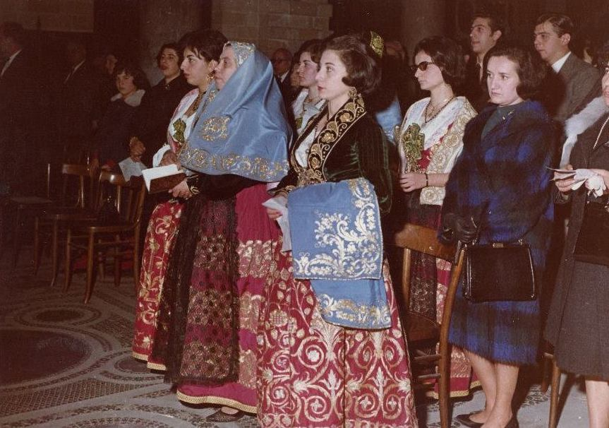 Donne di Piana degli Albanesi in costume tradizionale arberesh, Parrocchia di S. Nicola dei Greci alla Martorana, Eparchia di Piana degli Albanesi, Sicilia, Italia.